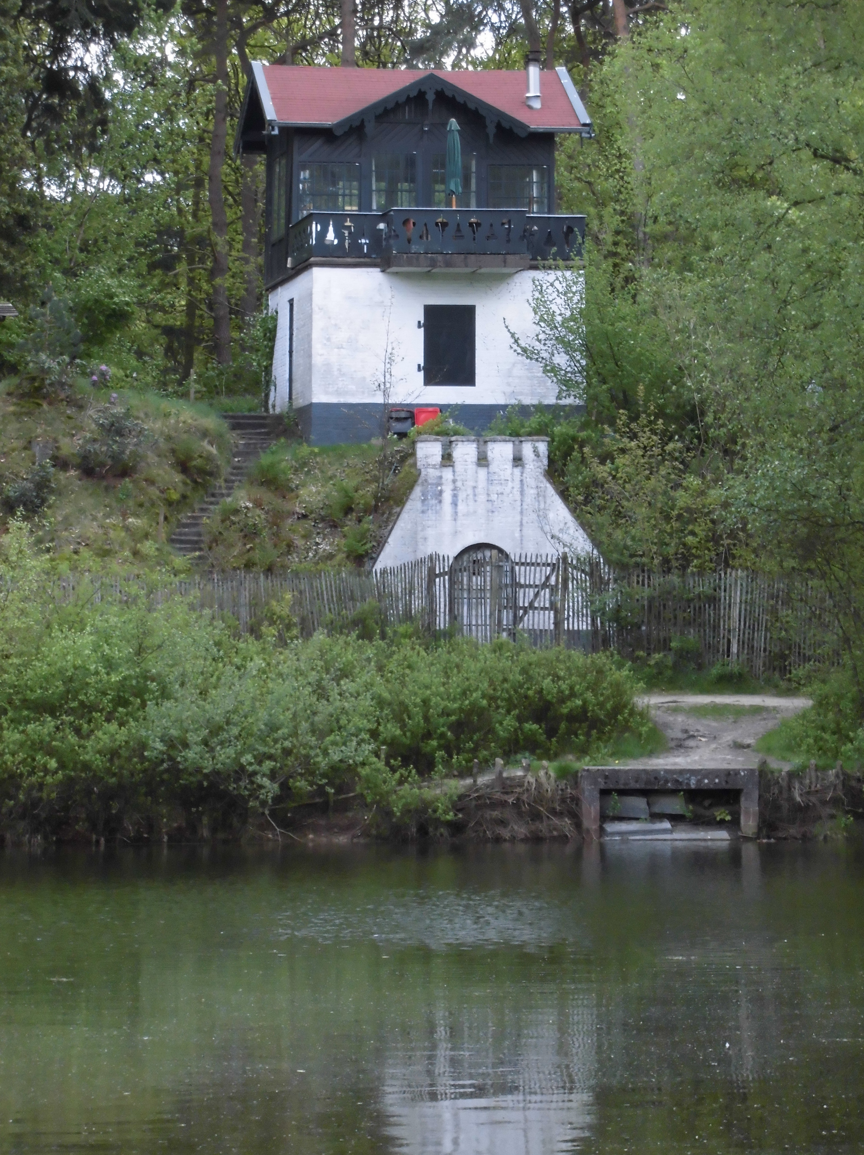 Heidestein, IJskelder en Tuinhuis Driebergen-Rijsenburg